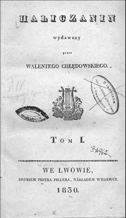 Haliczanin z 1830 r., tom I